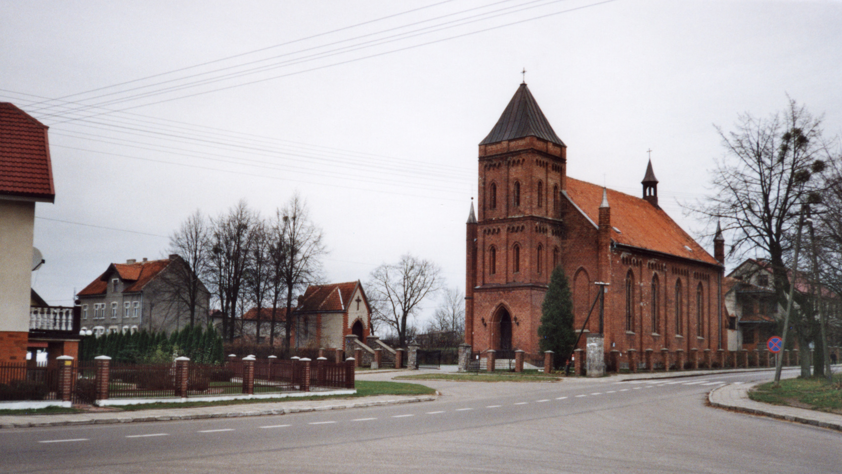 Miłakowo, ul. Mikołaja Kopernika 3 - kościół parafialny pw. Podwyższenia Krzyża Świętego, 2 poł. XIX w. (zabytek nr A-1923 i A-3128 z 10.03.1987)